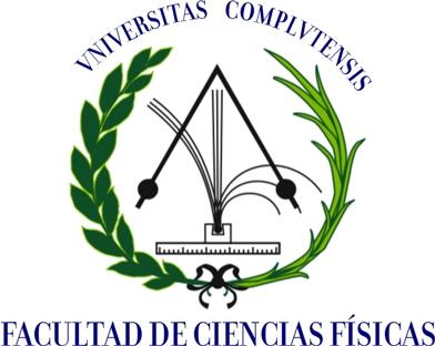 Logo de la Facultad de Ciencias Físicas de la UCM